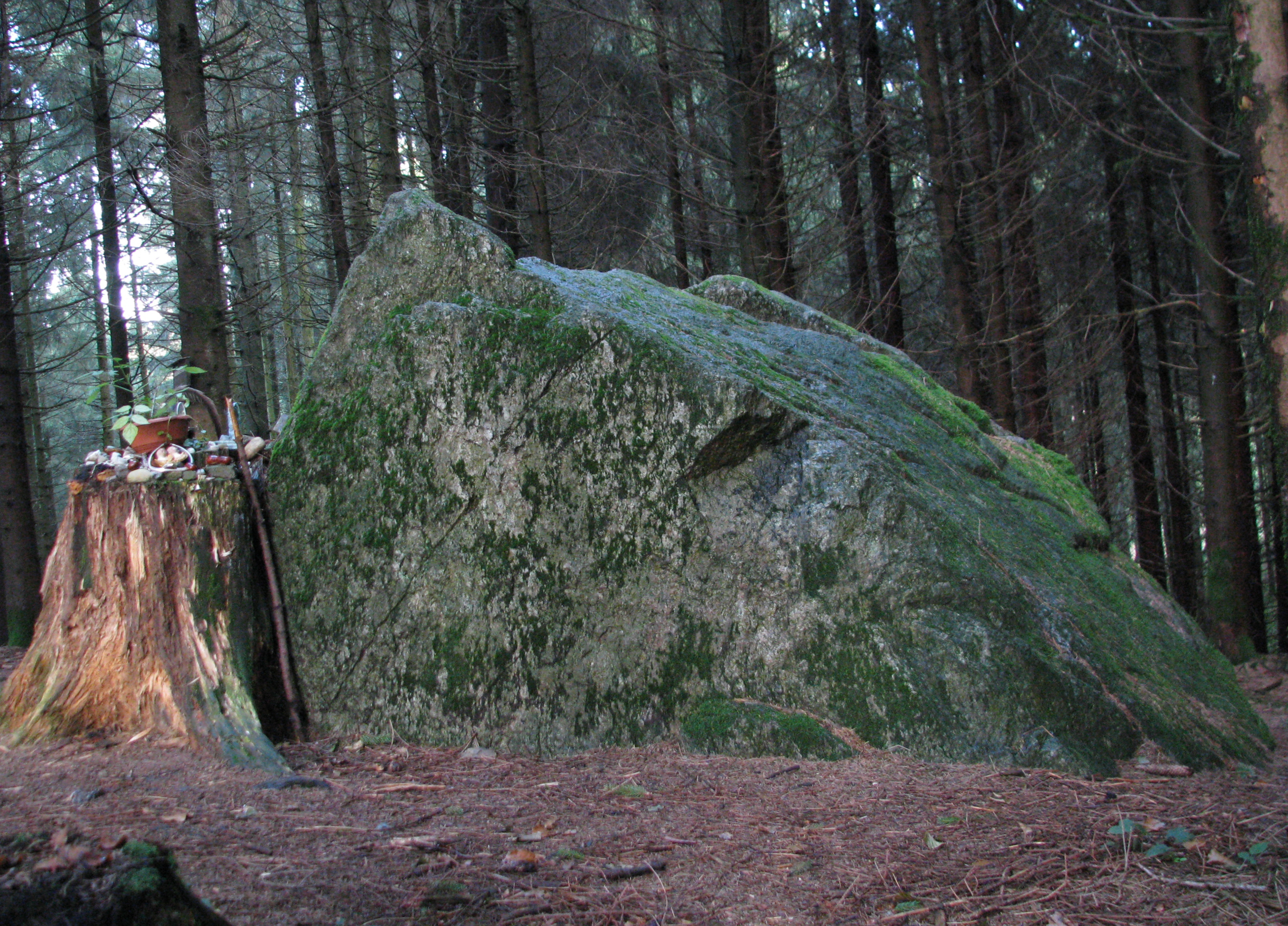 Sogenannter "Heiliger Stein" im Wald bei Kißlegg-Waltershofen. Erratischer Block aus der Würmeiszeit, geschätztes Gewicht etwa 39 Tonnen. Naturdenkmal ND8436015